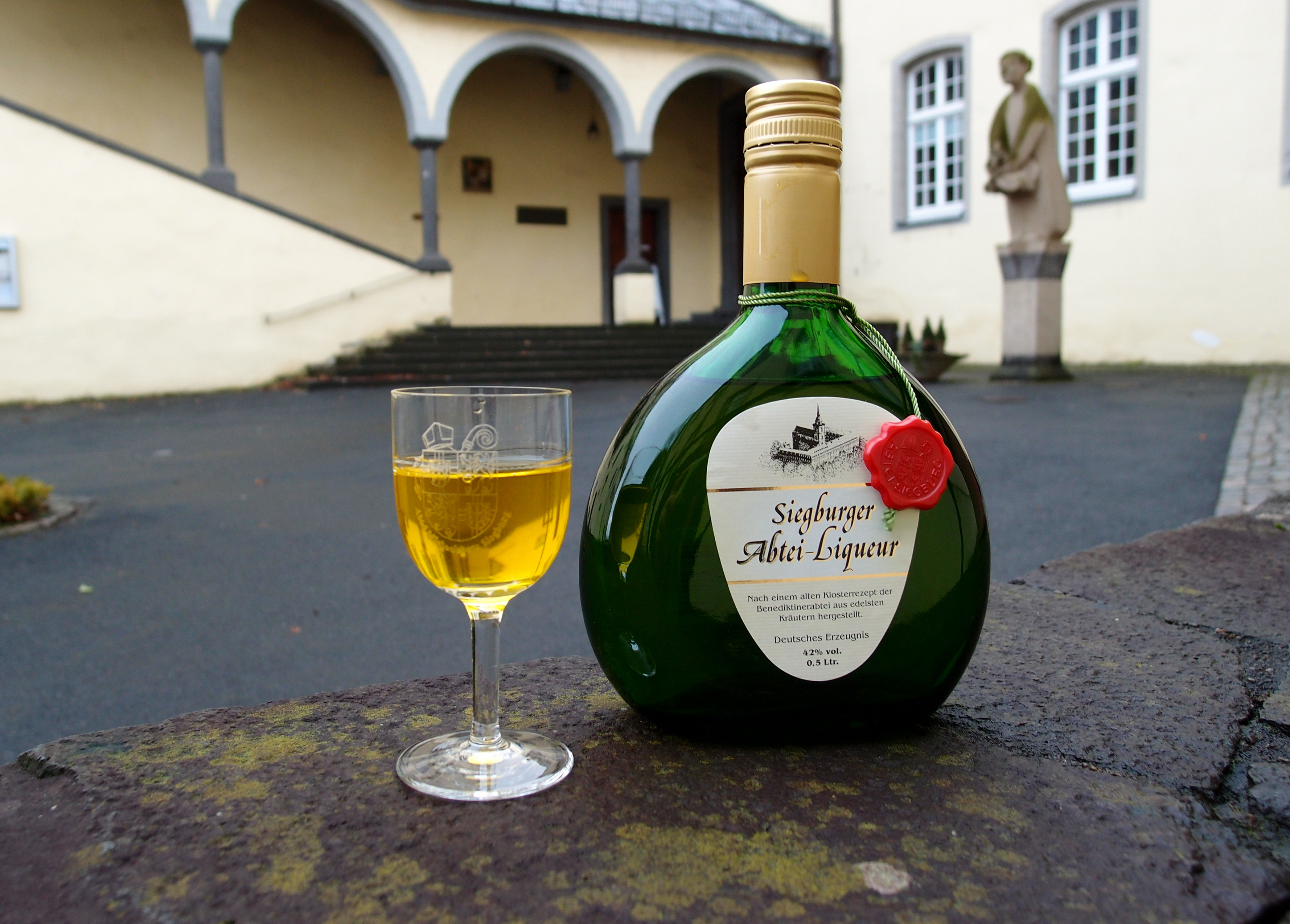 Siegburger Abtei-Liqueur Datum: 02.02.2013 Urheber: M. Pfeiffer alias Benutzer:Gordito1869 Quelle: privates Fotoarchiv des Urhebers